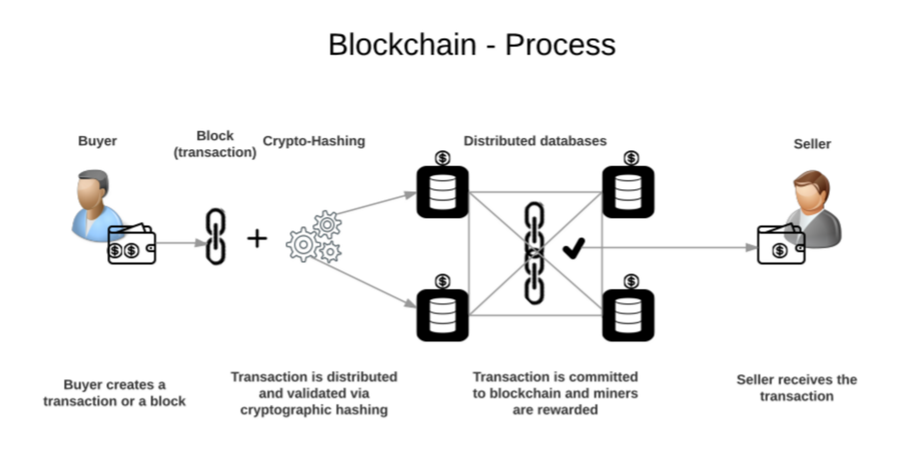 Монгол: Блокчэйний процесс